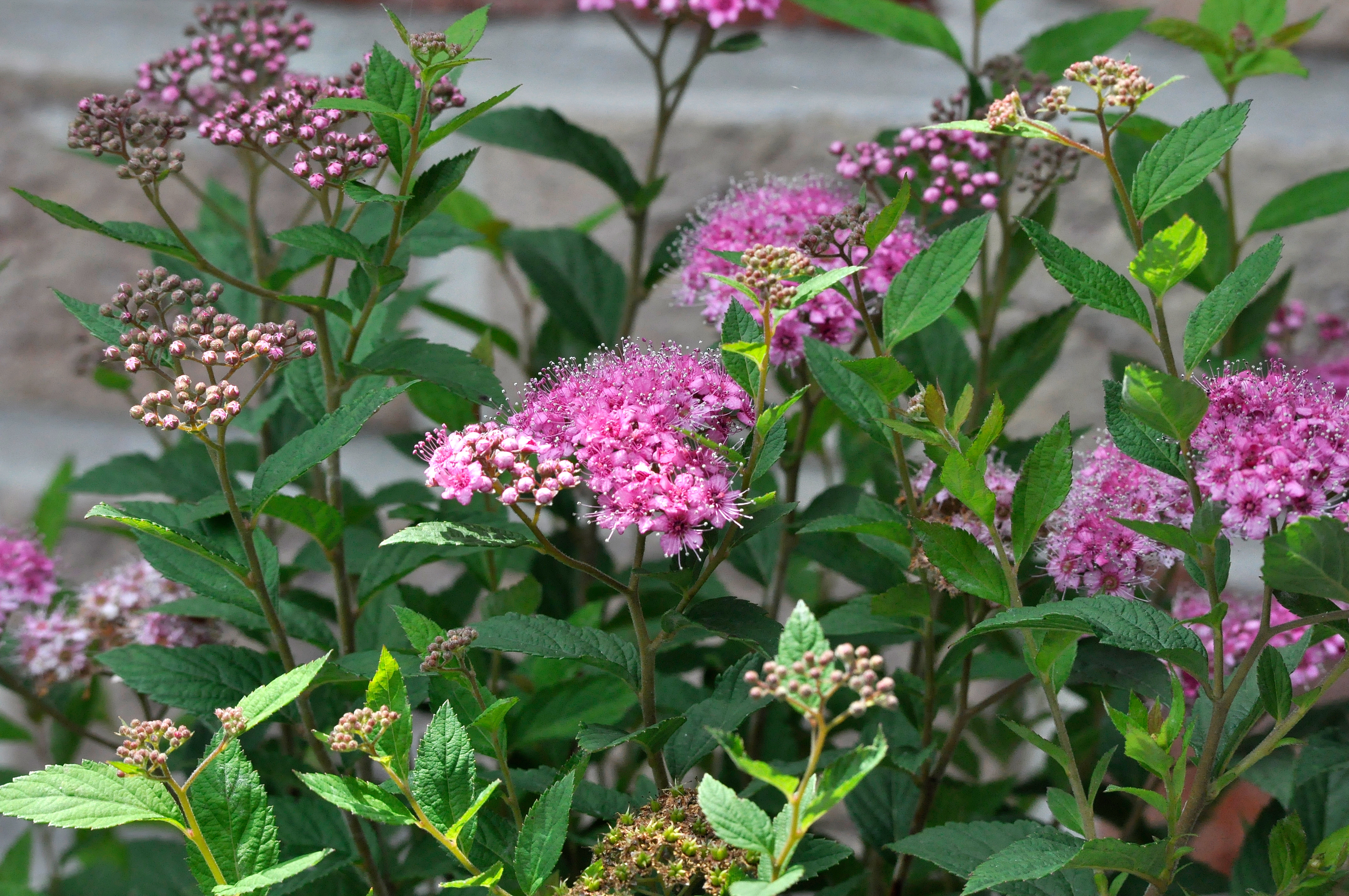 Spiraea japonica 'Nana'